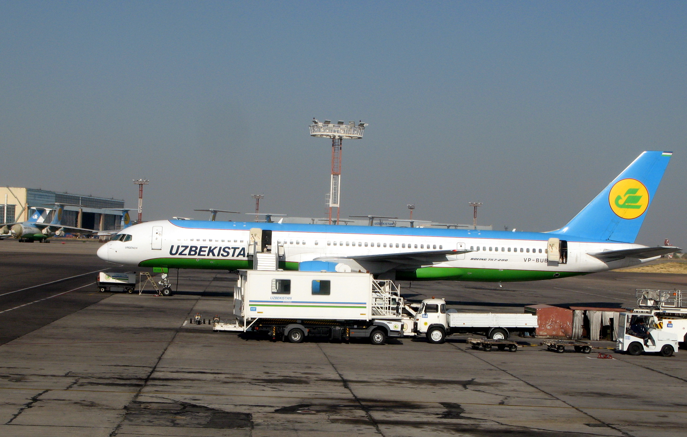 Tashkent airport